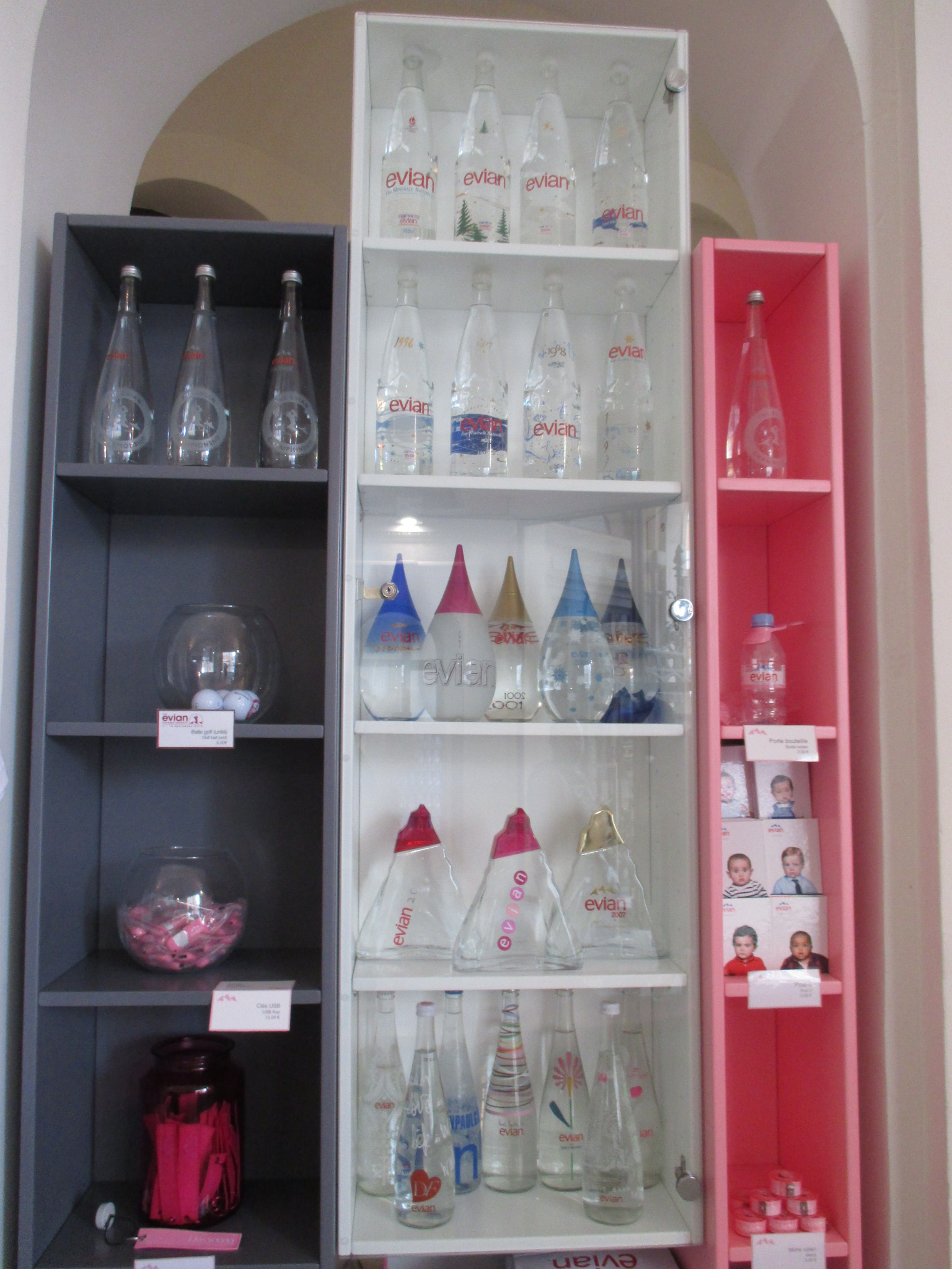 Evian